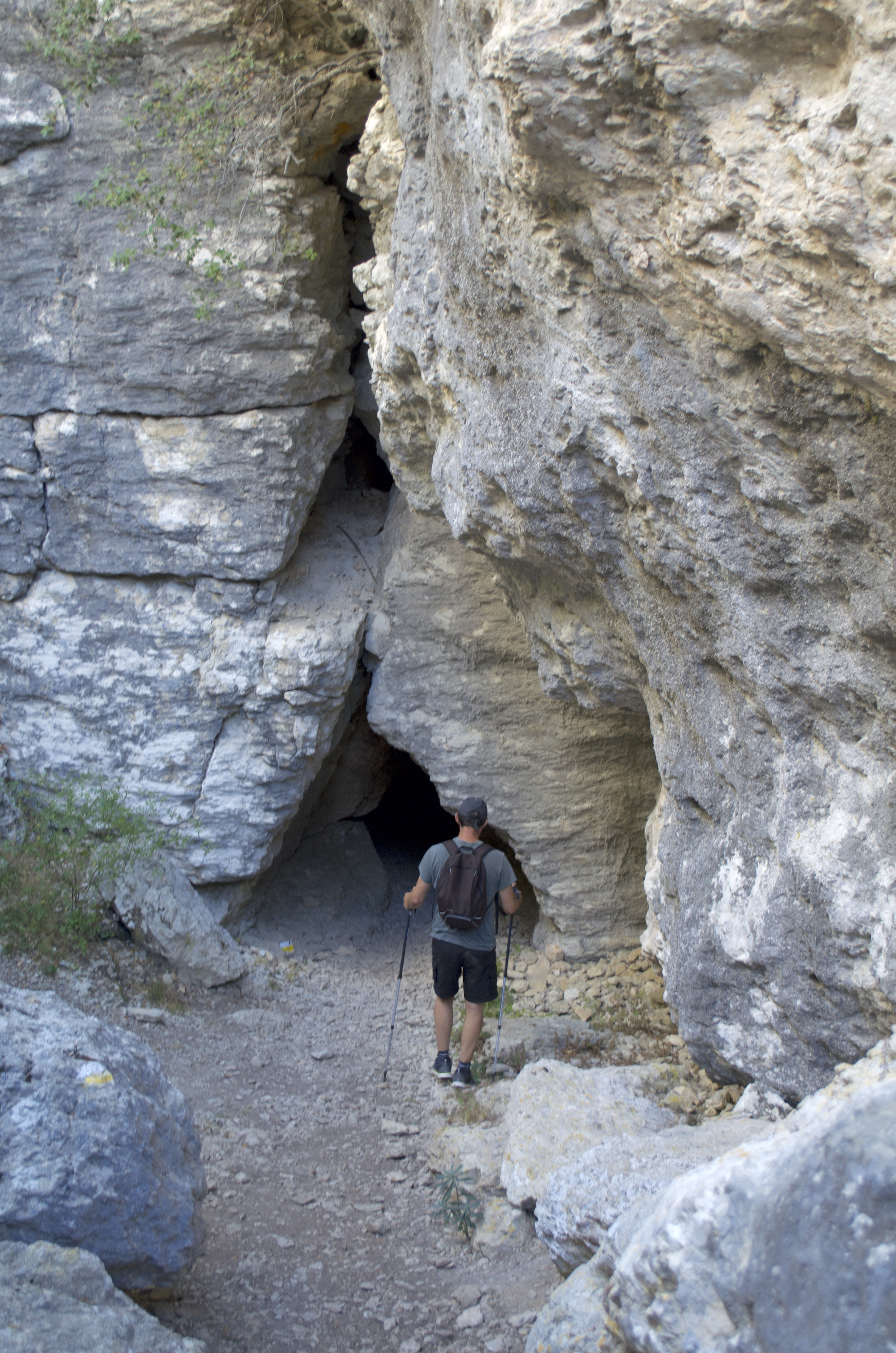 Entrada al «Ojo de Ollo» en el lado de la sierra o noroeste, y un senderista a punto de entrar en él